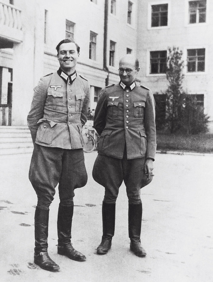 Oberst i.G. Claus Schenk Graf von Stauffenberg (links) und Oberst i.G. Albrecht Ritter Mertz von Quirnheim (rechts)